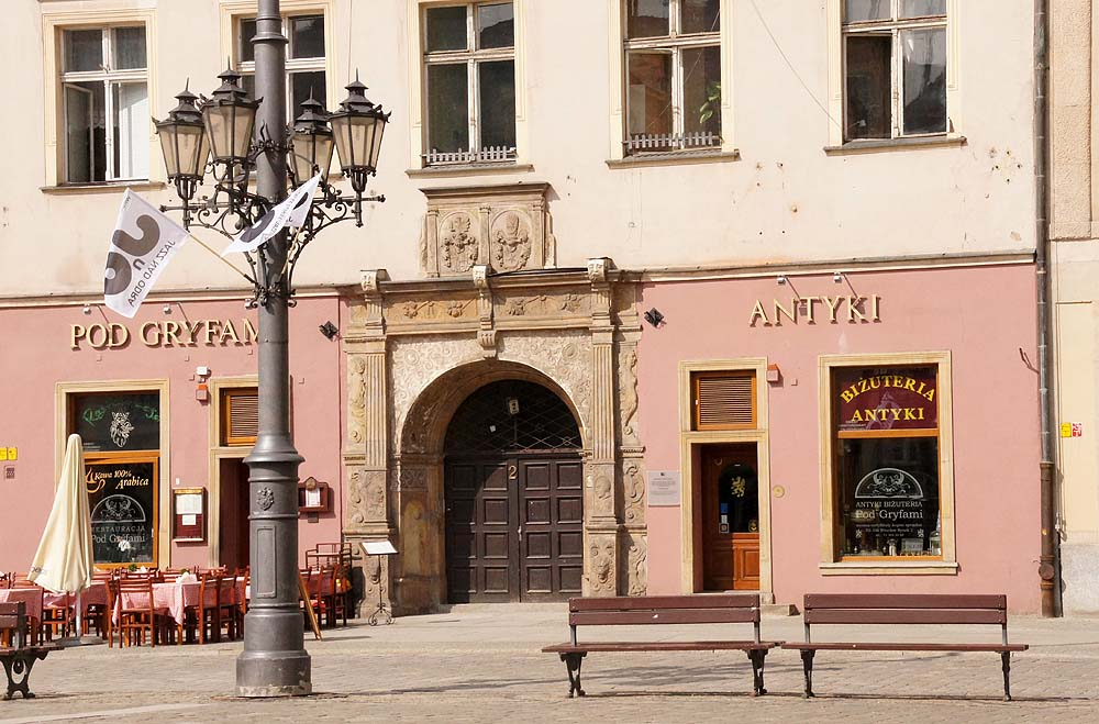 Blok zachodni Rynku (budynki wraz z oficynami i przejściami wewnętrznymi), ograniczony ul. Kiełbaśniczą, ul. św. Mikołaja, pl. Solnym i Rynkiem Rynek, Miasto Wrocław - Stare Miasto